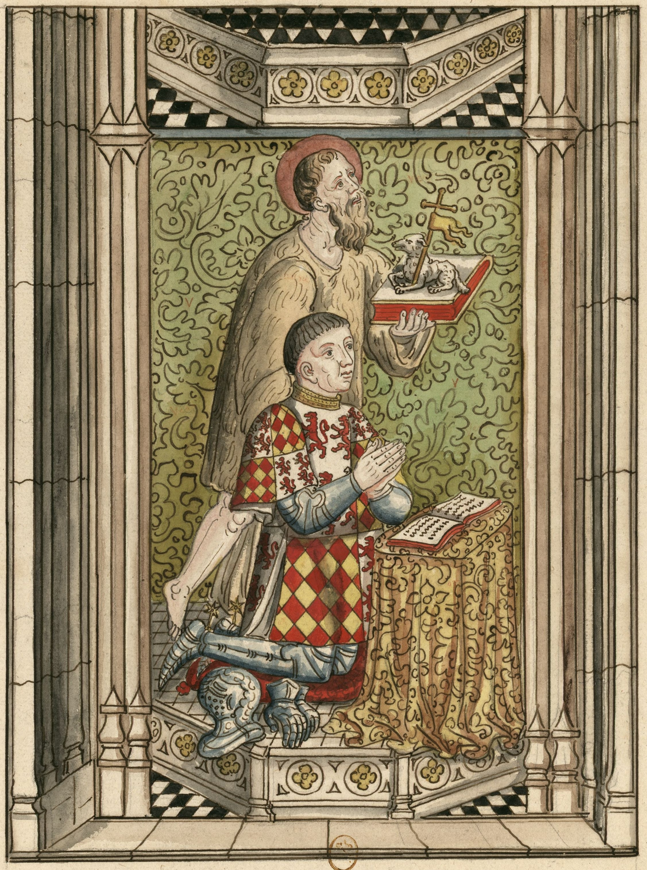 Cordeliers // Cette figure est aux vitres derrière le grand autel : Elle est de Louis seigneur de Beauvau de Champigny et de la Rochesuryon, Chambellan du Roy de Sicile, et grand senechal d'Anjou et de Provence, mort en 1462 : [dessin] / [Louis Boudan?]